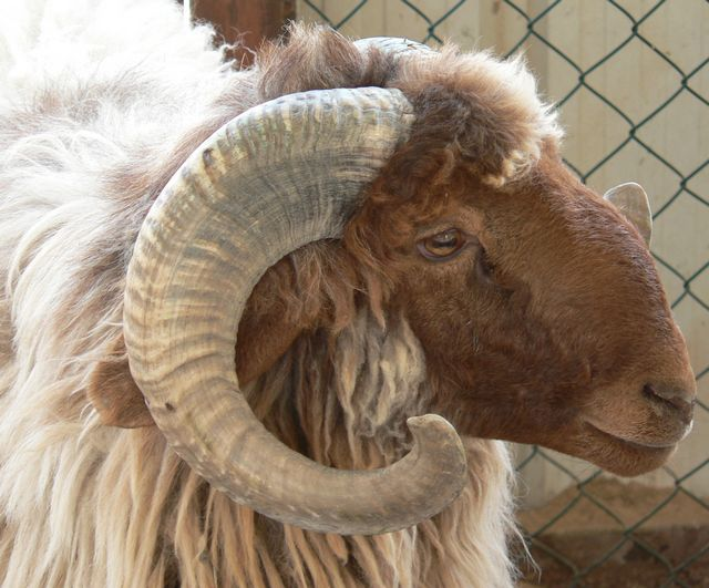 A Awassi ram in Kuwait.